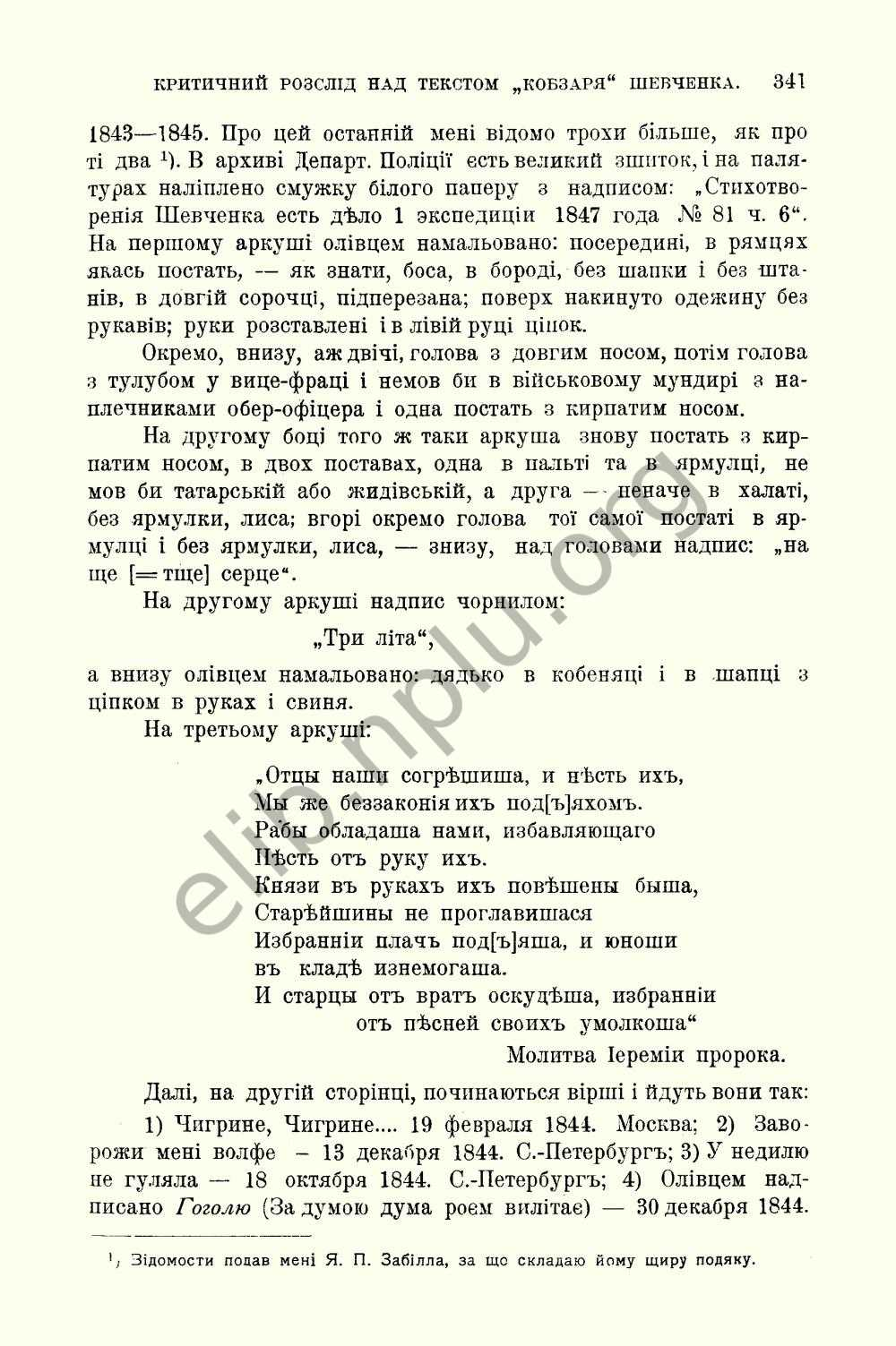 В. Доманицький. Критичний розлід над текстом ”Кобзаря” Шевченка. — Киевская старина. — 1906. — Т. 94. Ноябрь-декабрь. — С. 341